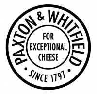 Logo Paxton and Whitfield